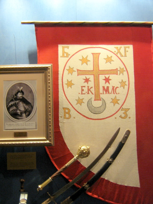 Прапор Богдана Хмельницького. Реконструкцiя. Iсторичний музей в Чигирині.